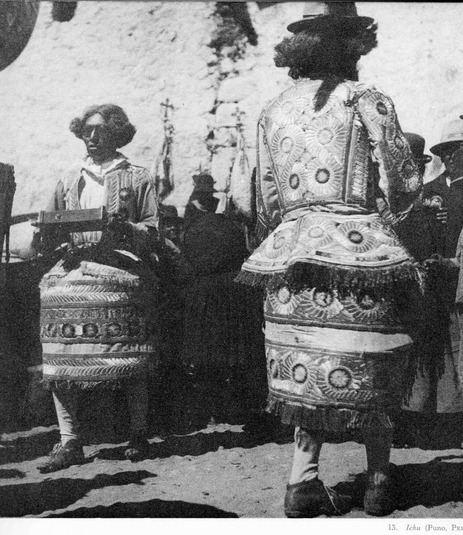 Pierre Verger de nacionalidad francesa recorre Puno donde incluye numerosas expresiones del altiplano peruano, a donde llegó en el año 1939. "Fiestas y danzas en el Cuzco y los andes". Pierre Verger. Editorial Sudamericana, Buenos Aires 1945. Recuperado por Carlos Portugal Mendoza 2018